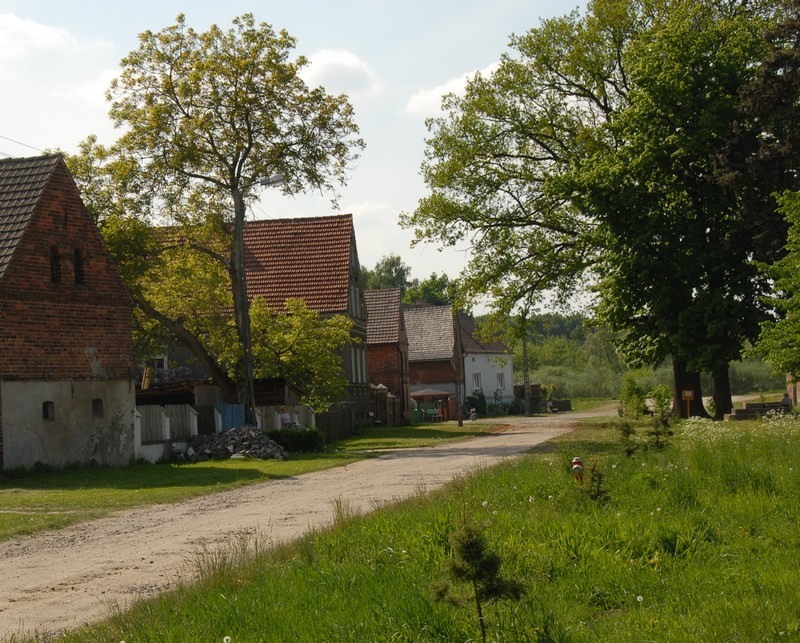 Centrum wioski Późna